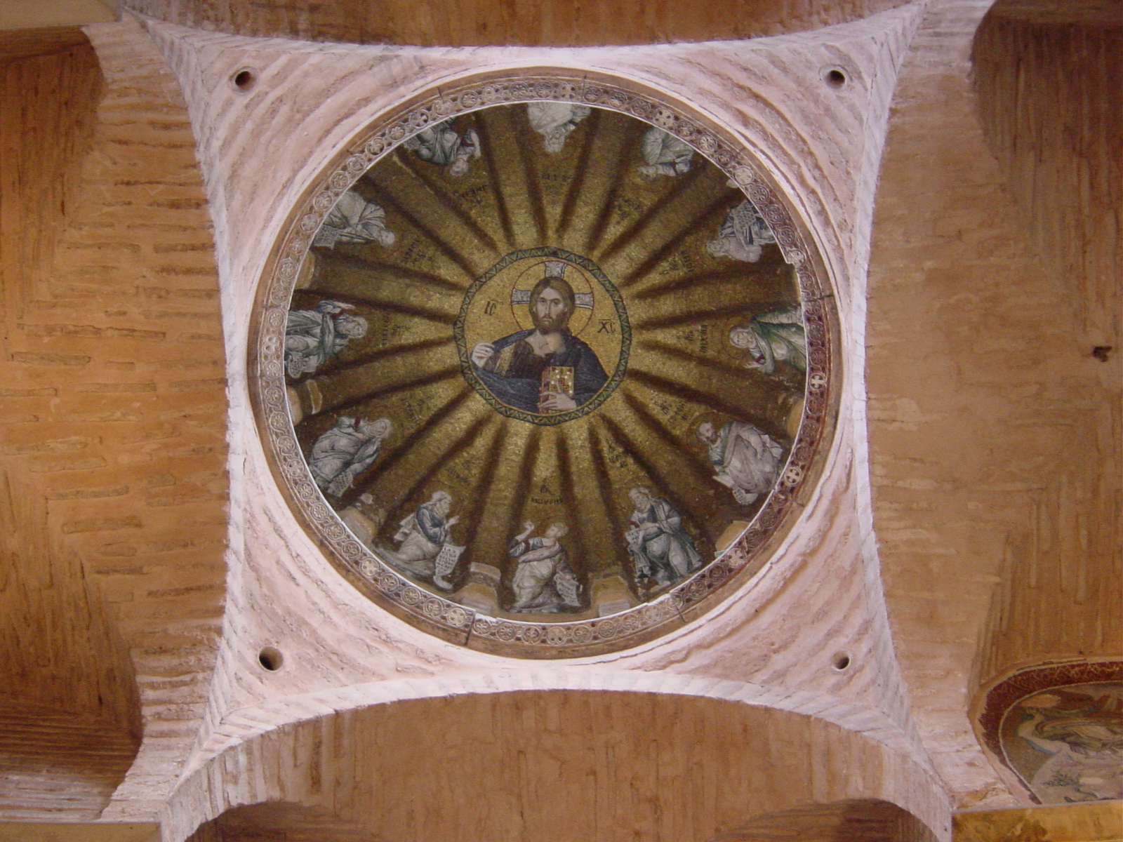 Istanbul: Museo dell'ex chiesa del Pammacaristos (Fetiye camii). Cupola con mosaico bizantino del XIV secolo rappresentante il Cristo Pantocratore circondato da figure di santi. Foto di: Giovanni Dall'Orto, 26-5-2006.